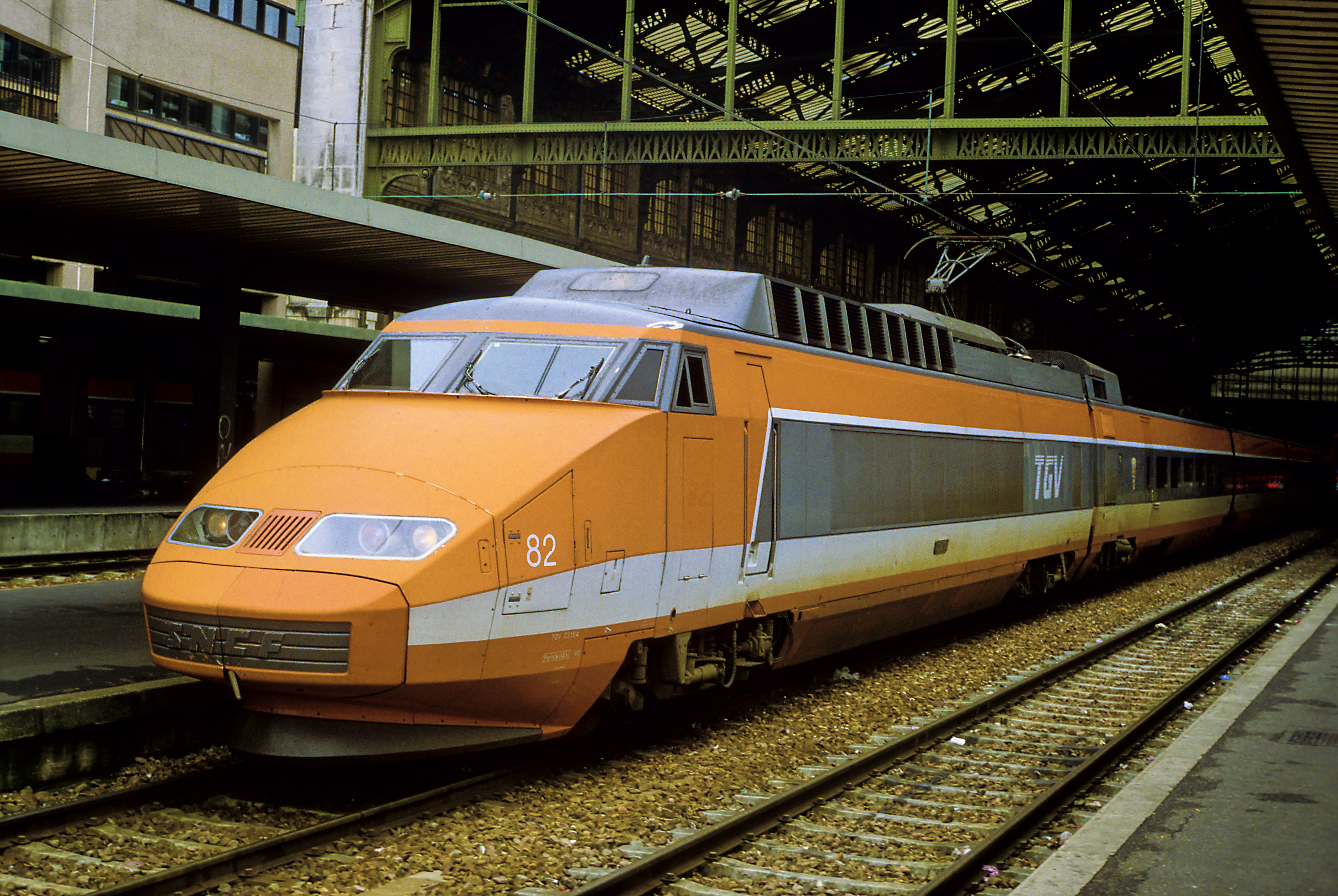 TGV Sud-Est (PSE) im Ursprungslack im Bahnhof Paris-Lyon